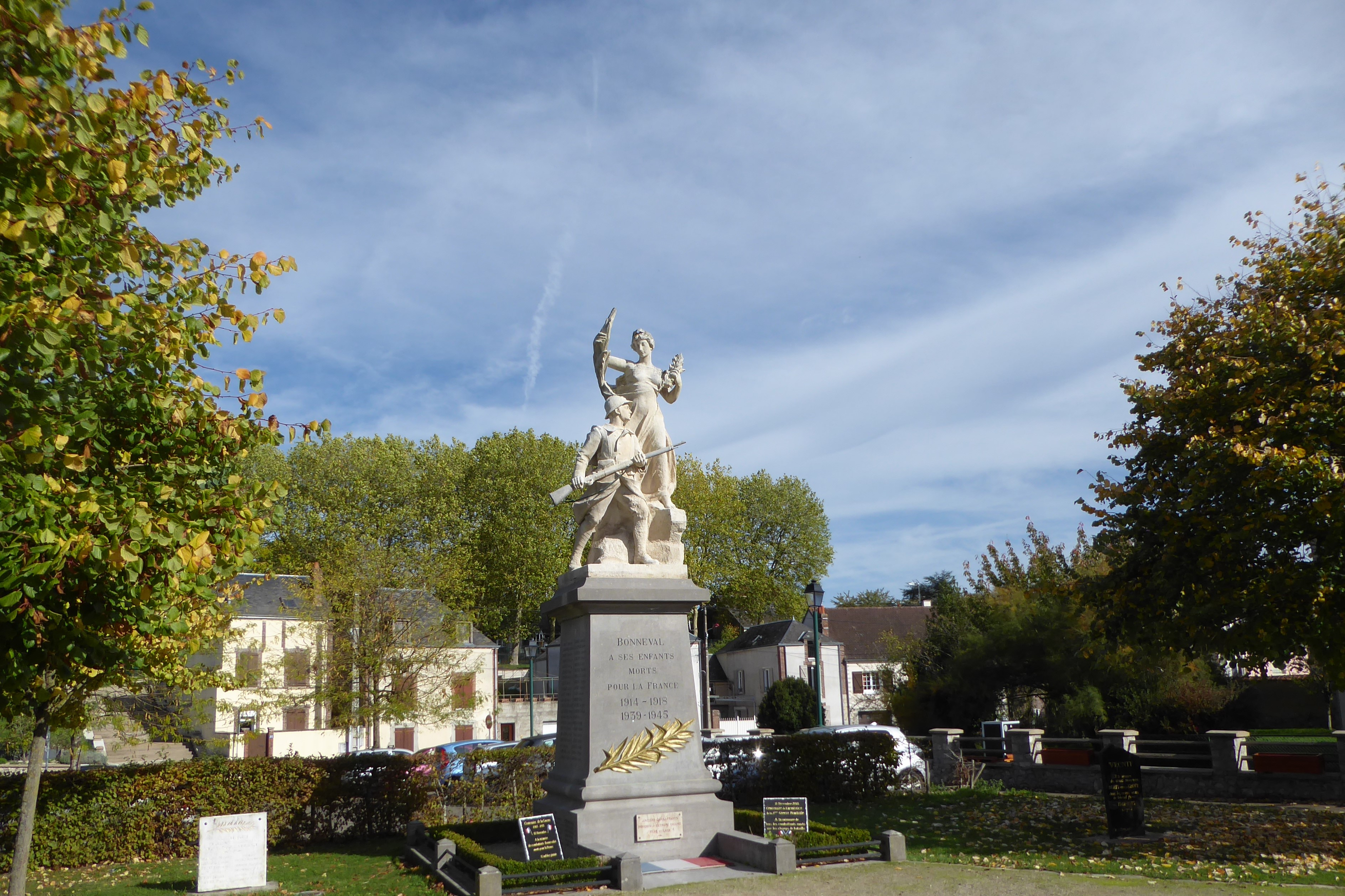 monument aux morts de Bonneval par Félix Charpentier, Eure-et-Loir, France.